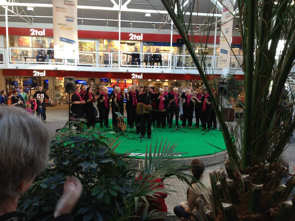 Spirit of Joy - Hadsund Kirkes Gospelkor på scenen i Butikscenteret